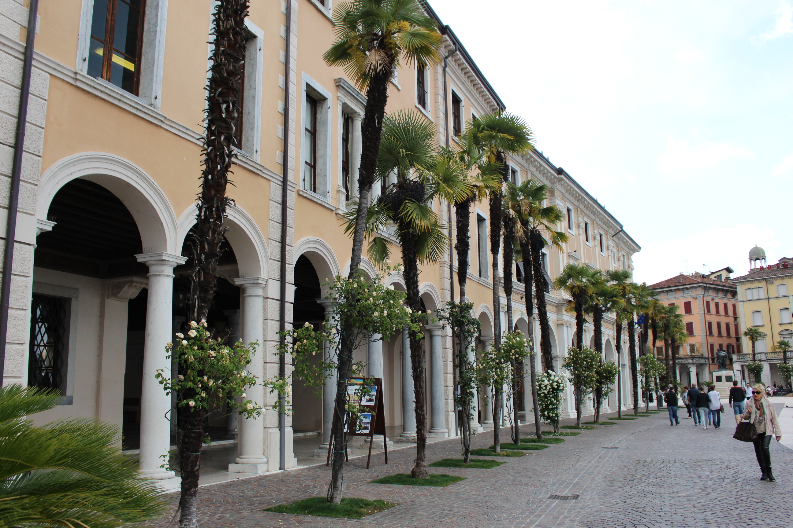 Palazzo Comunale e loggia della Magnifica Patria This is a photo of a monument which is part of cultural heritage of Italy.